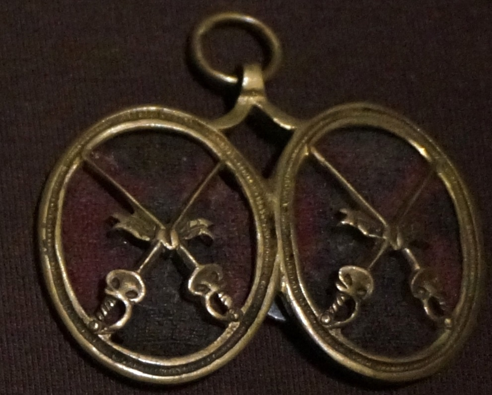 Collections of Musée de l'armée.